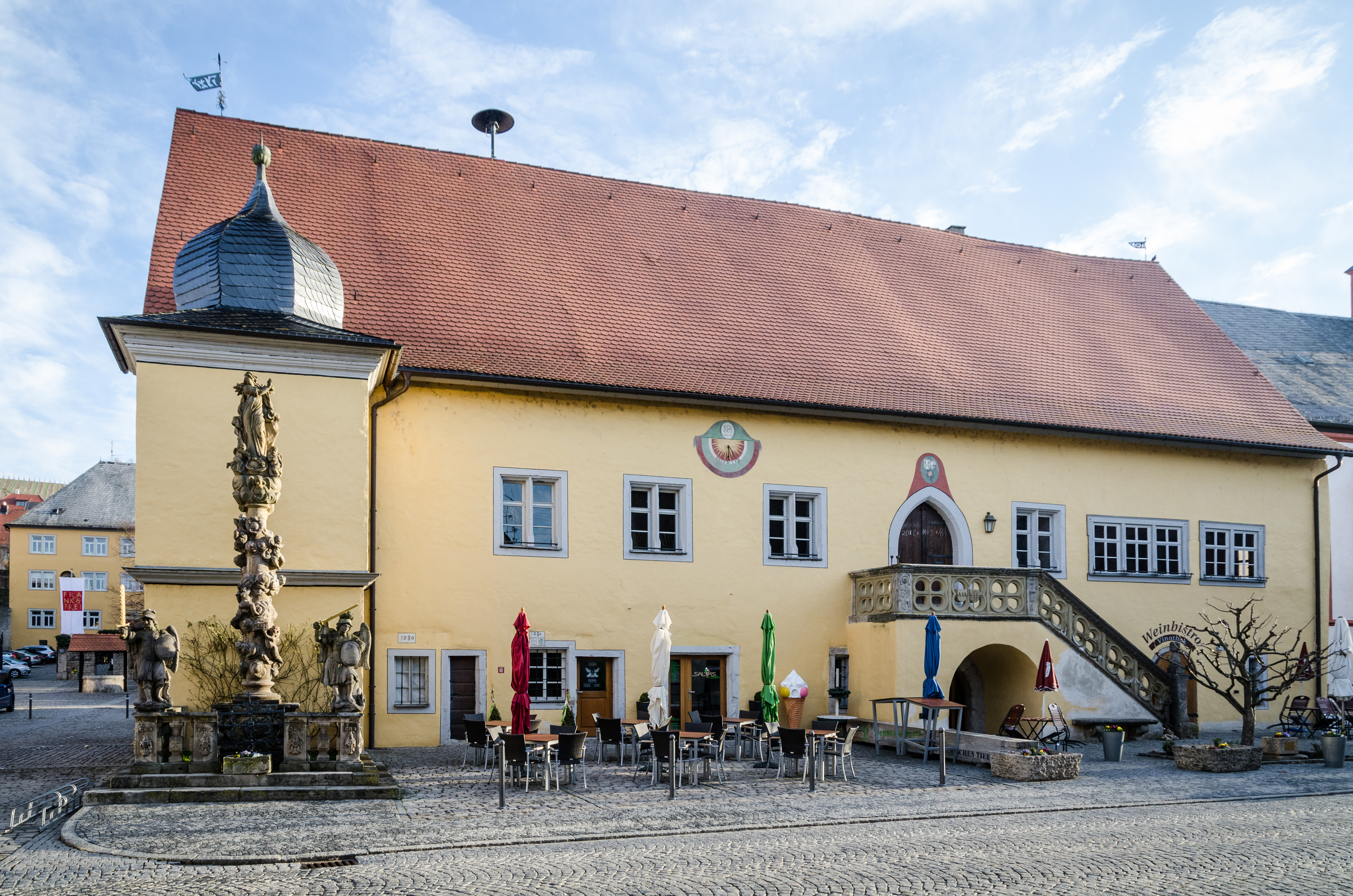 Frickenhausen, Hauptstraße 13